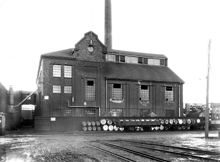 Oljefabrik på Barlastholmen i Kalmar. Byggnaden inrymmer Byteatern - Kalmar läns teater sedan 1982. Bilden är tagen 1931.